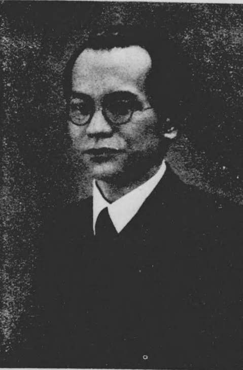 高石 幸三郎